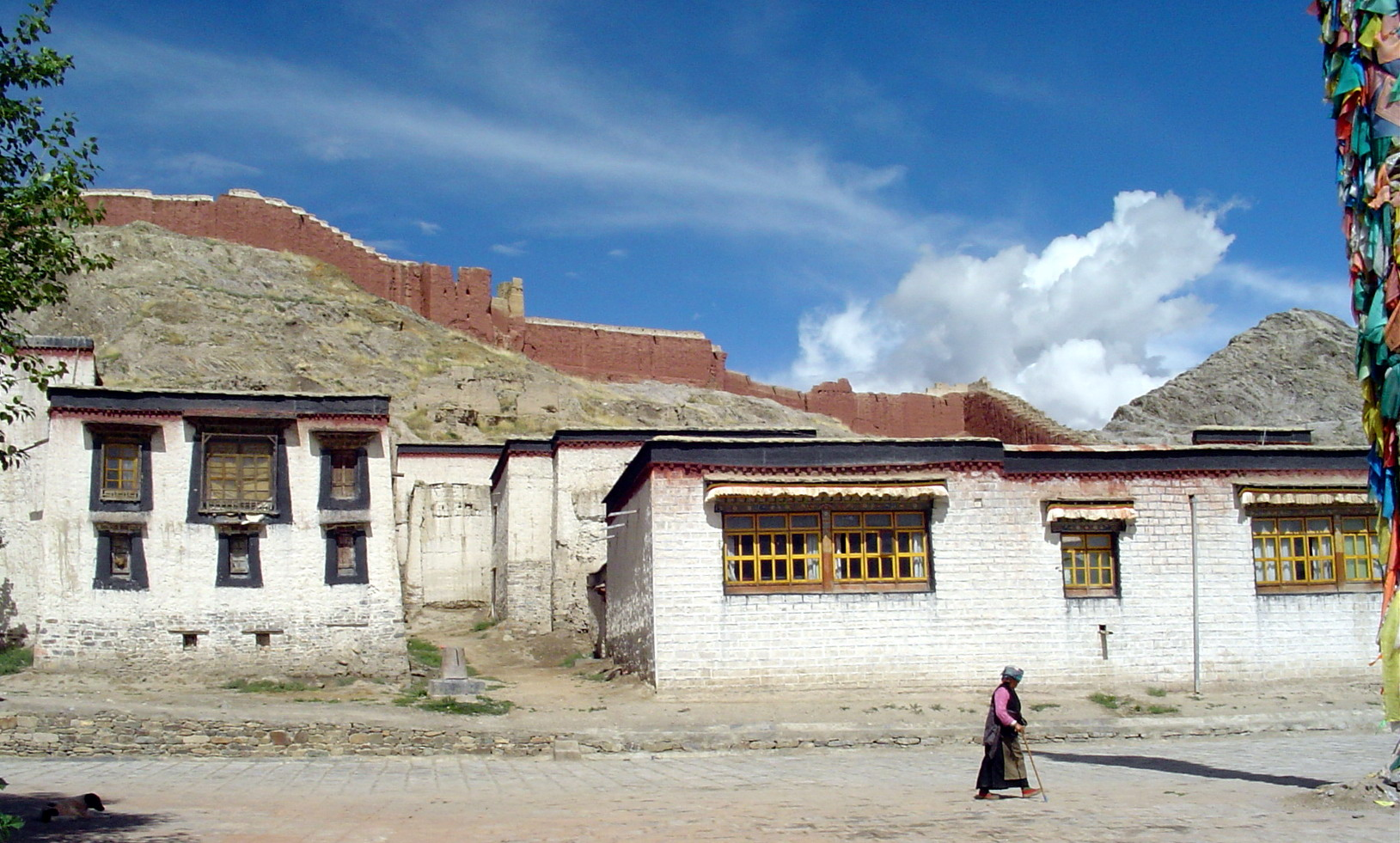 Монастырь Пелкор ЧёдеМалые монастыри в составе комплекса Пелкор Чёде в Гьянтсе на Тибете